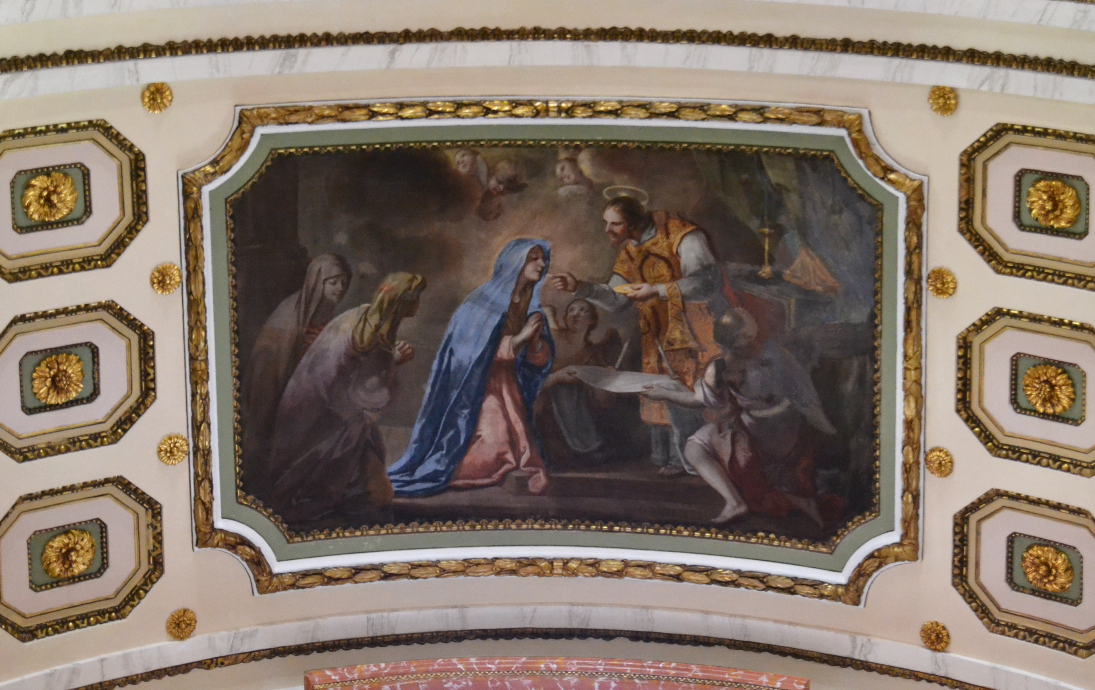 Sant Joan Evangelista donant la Comunió a la Verge Maria (1693-1694), obra dels germans Vicent i Eugeni Guilló Barceló. Fresc a la volta de la capella de la Comunió, església de sant Joan del Mercat, València.